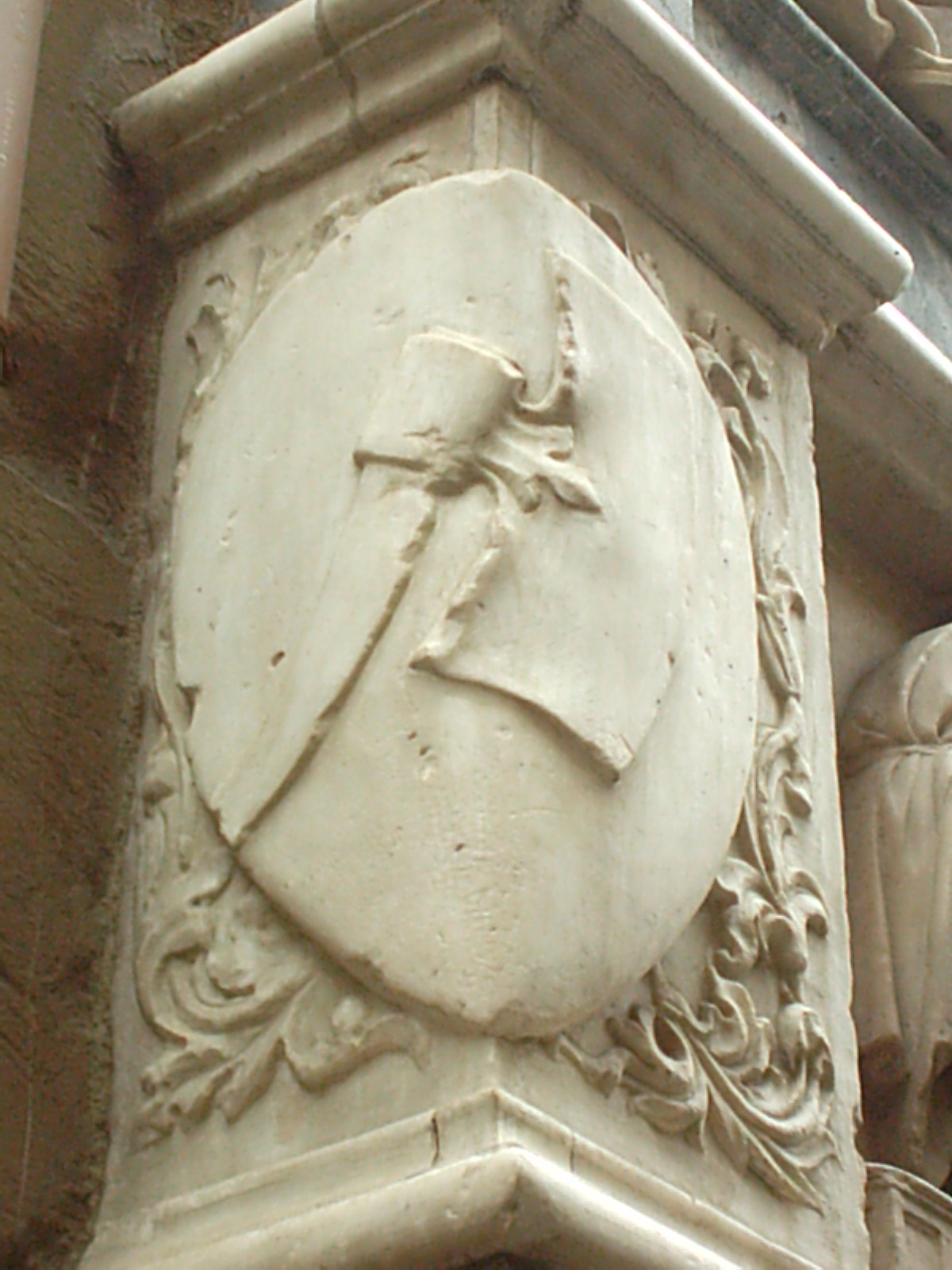 stemma dell'arte dei maestri di pietra e legname, dettaglio del tabernacolo della corporazione nella chiesa di Orsanmichele a Firenze